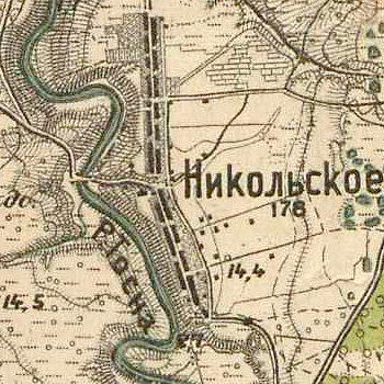 Село Никольское на карте района манёвров 1913 года.